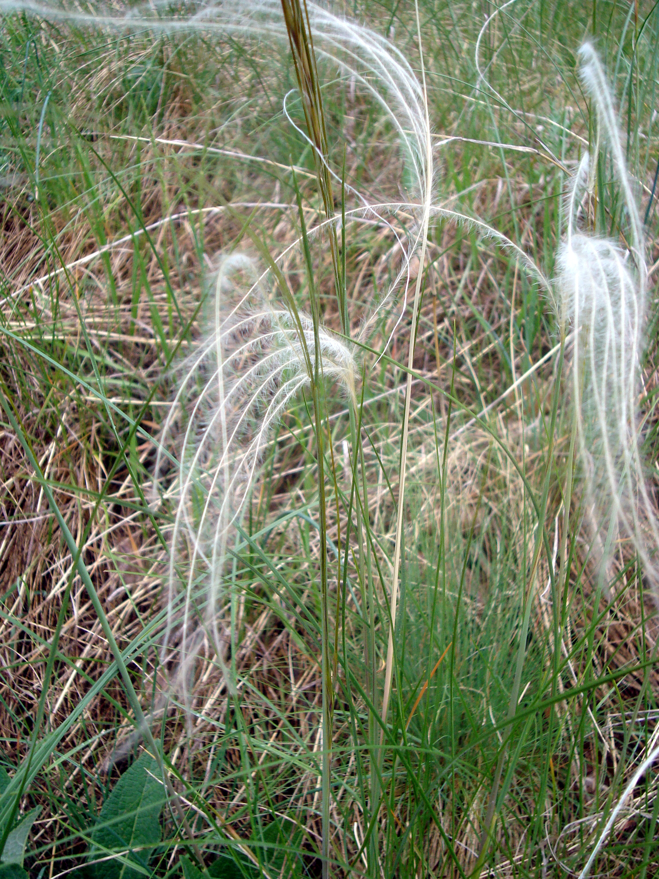 kavyl chlupatýLatina: Stipa dasyphylla